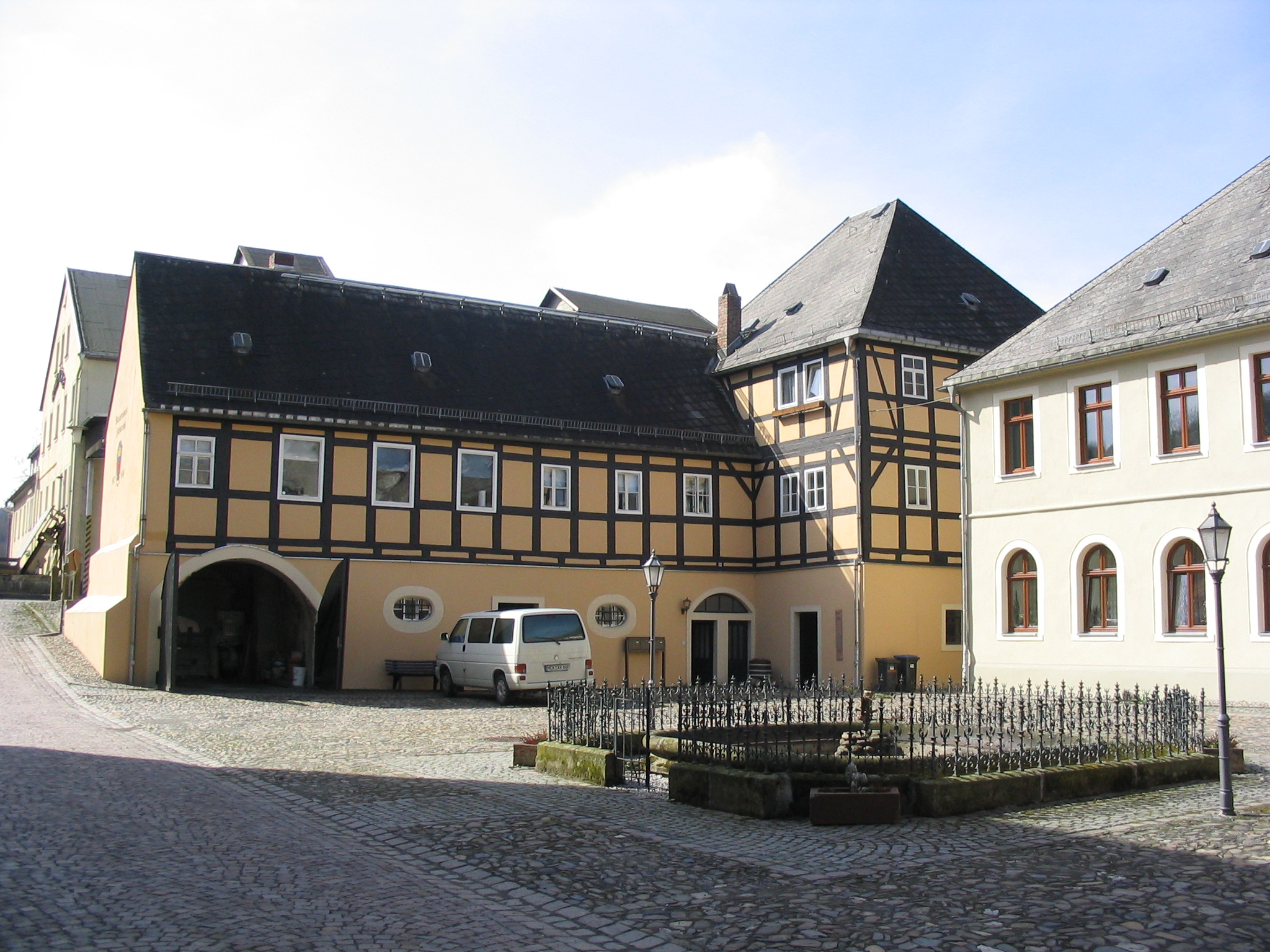 Blaufarbenwerk Zschopenthal, Blick zum Stallgebäude, aufgenommen am 15.04.2006 von Dr. Hagen Graebner